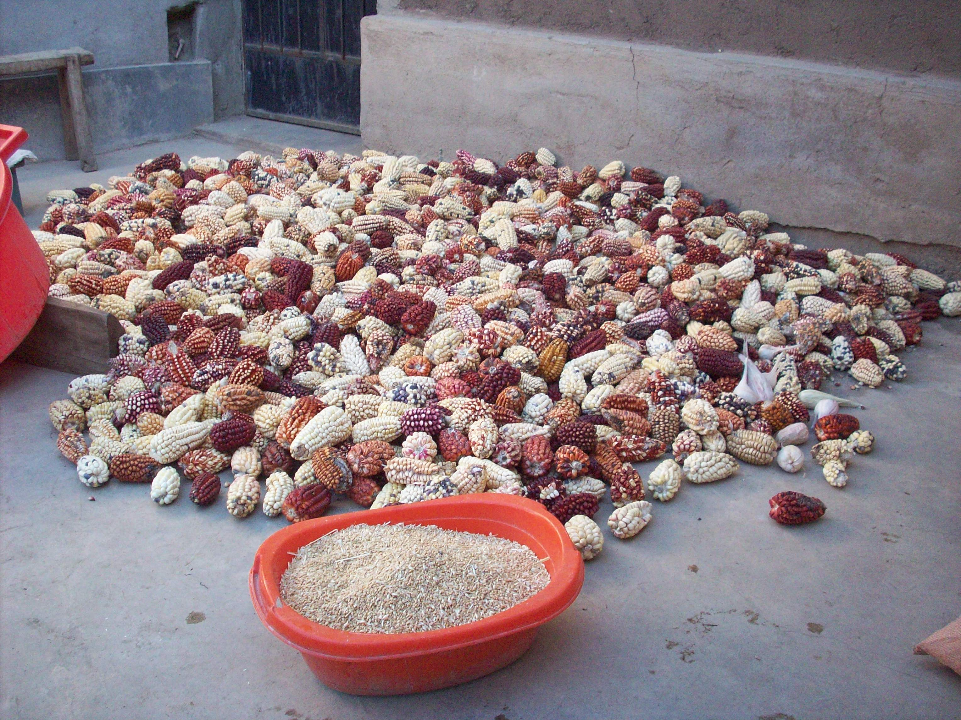 Maiz llipta de ocaña peru